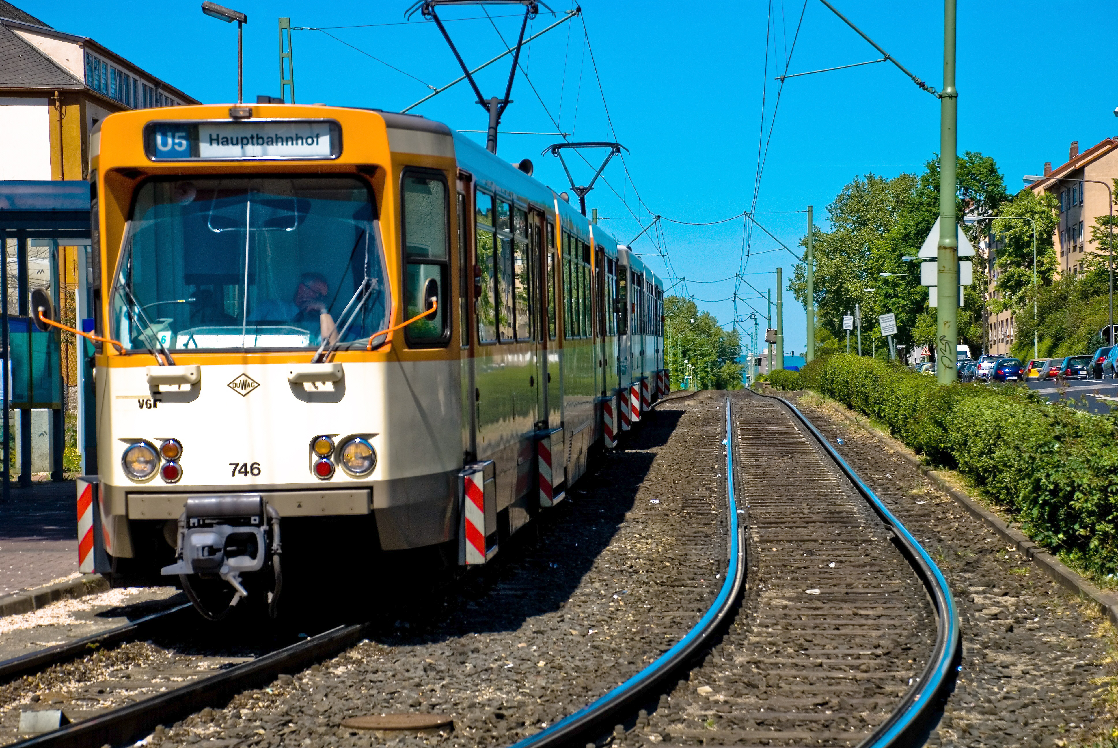 Zug der U5 mit Ptb-Wagen an der Haltestelle Gießener Straße